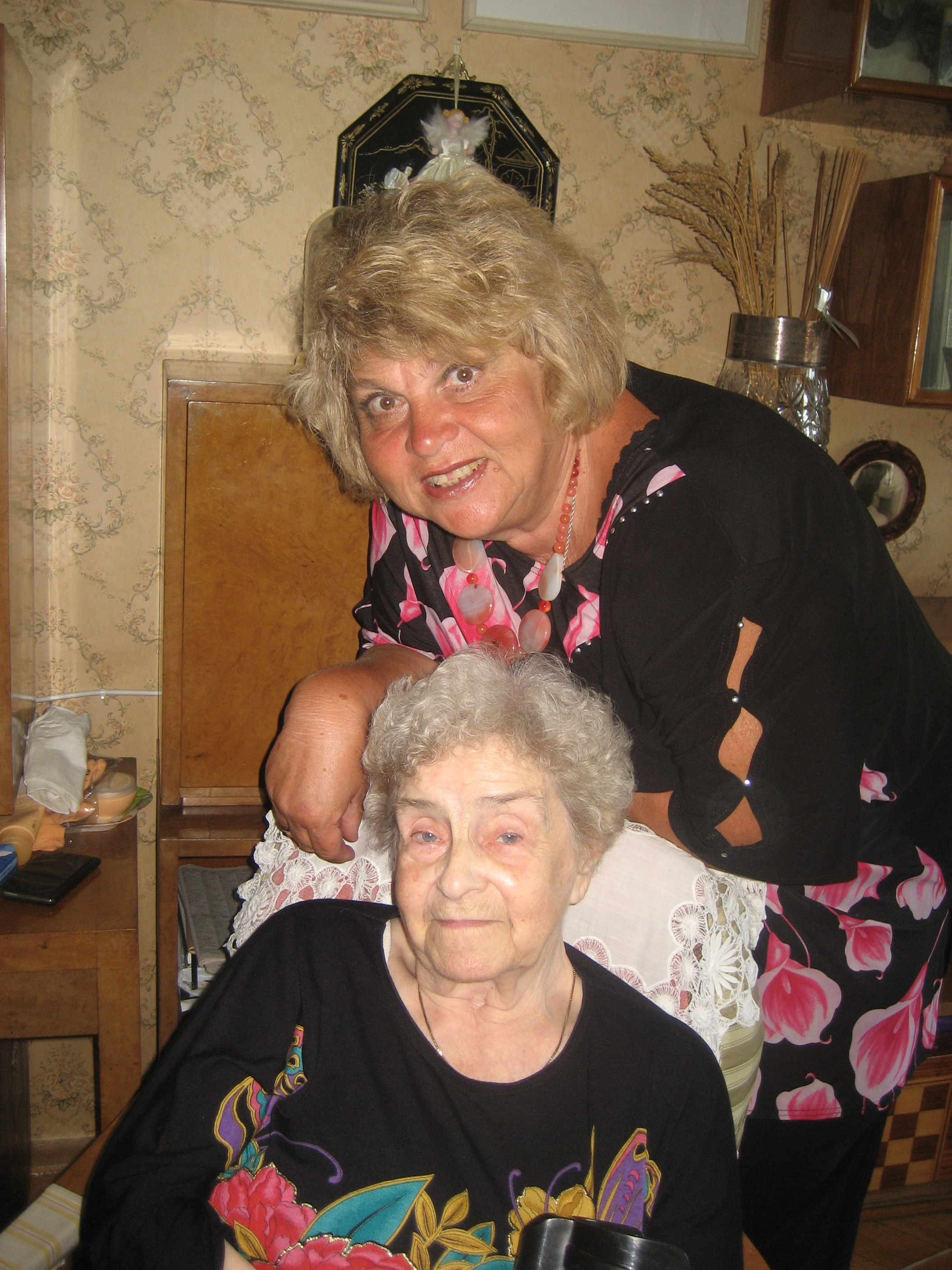 Фото. Останні роки життя видатної арфістки. Квартира в Києві. З ученицею Діаною Корчинською.